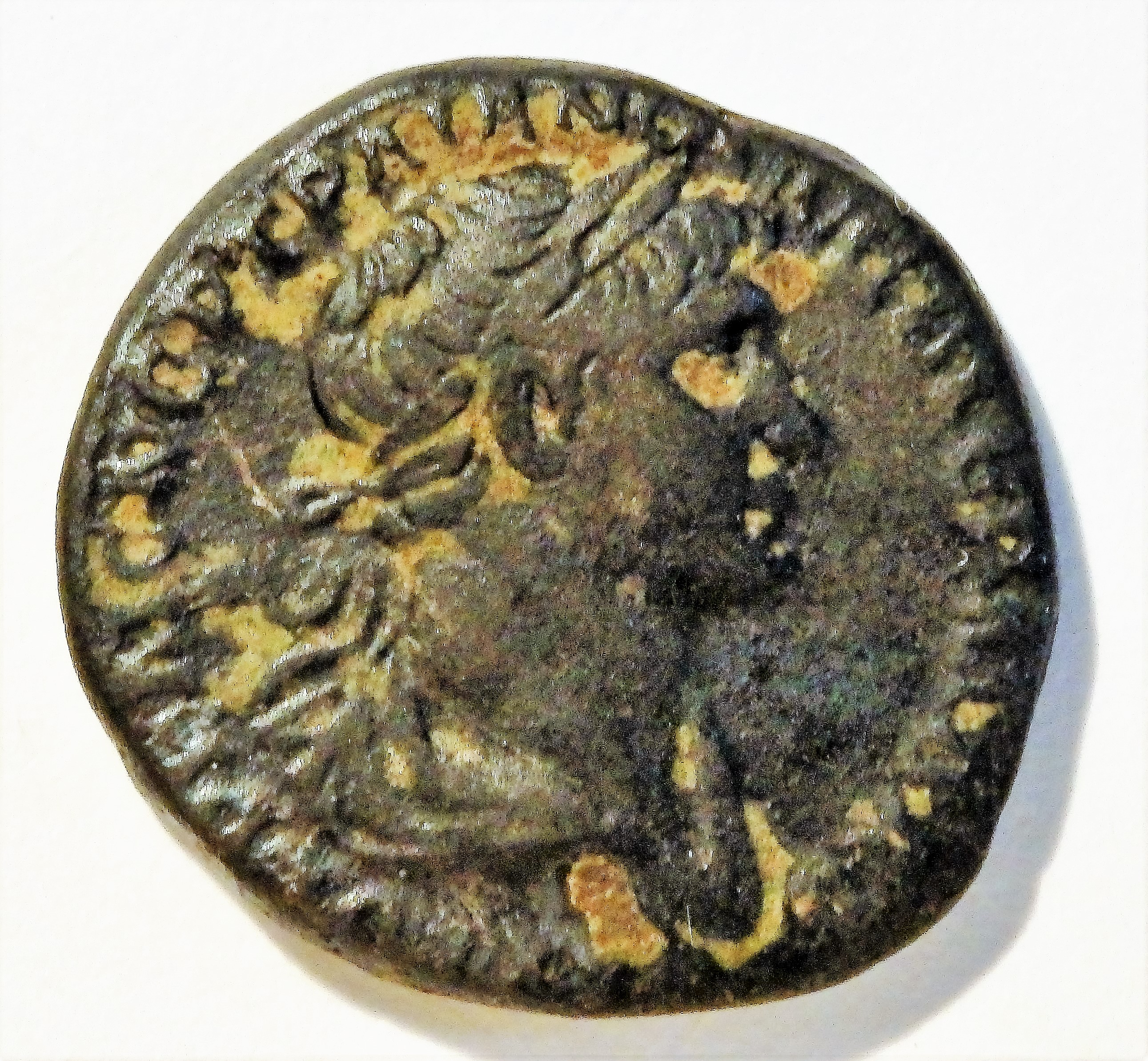 Porträtseite der Didrachme, v. Aul. 6403